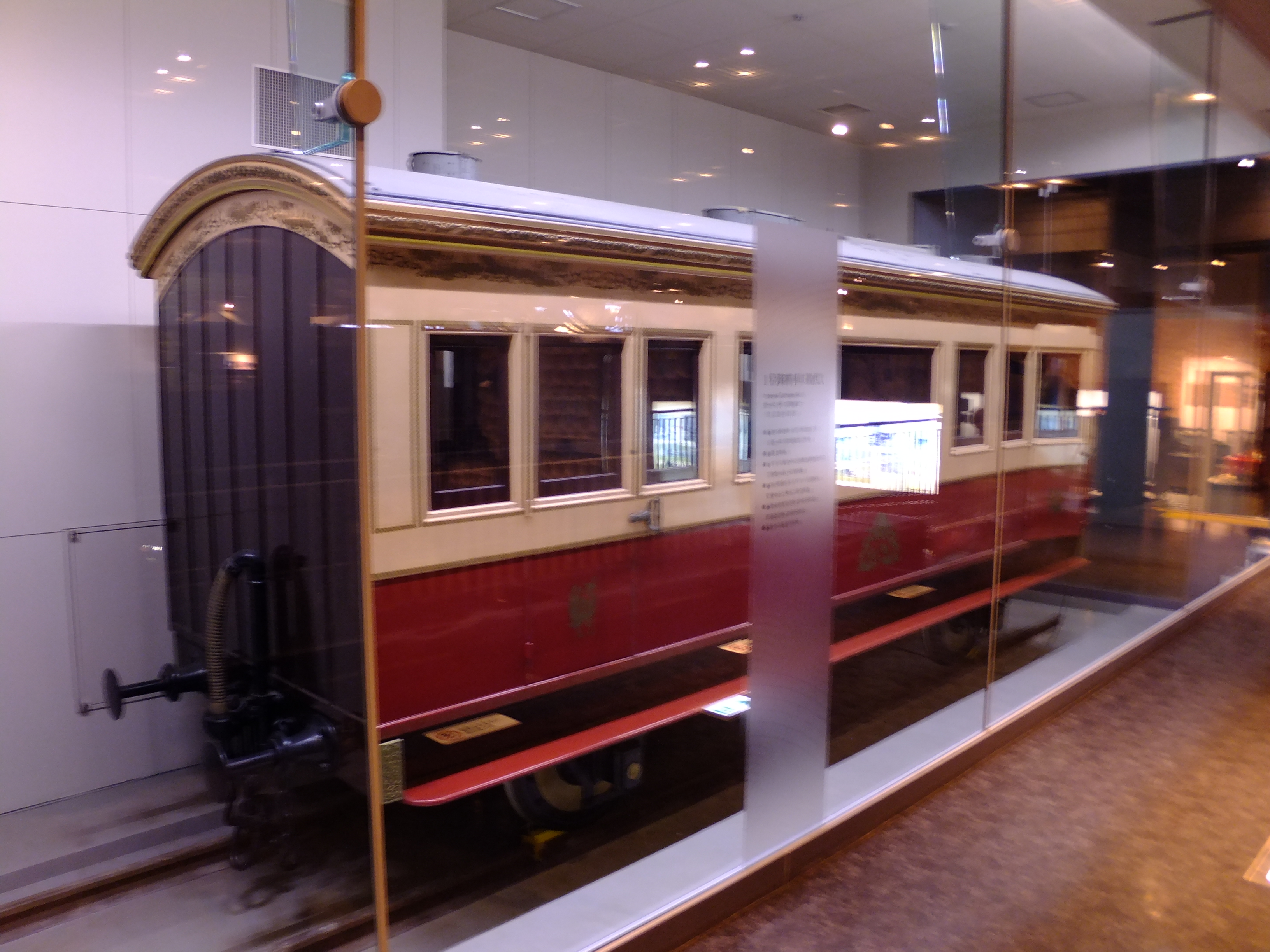 1号御料車（初代）。さいたま市・鉄道博物館にて